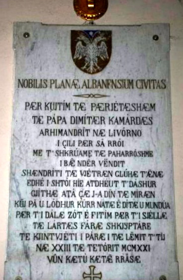 Patrimonio artistico e culturale della Cattedrale di San Demetrio Megalomartire. Iscrizione marmorea celebrativa in lingua albanese, in memoria di papàs Demetrio Camarda (Dhimitër Kamarda), con lo stemma albanese.